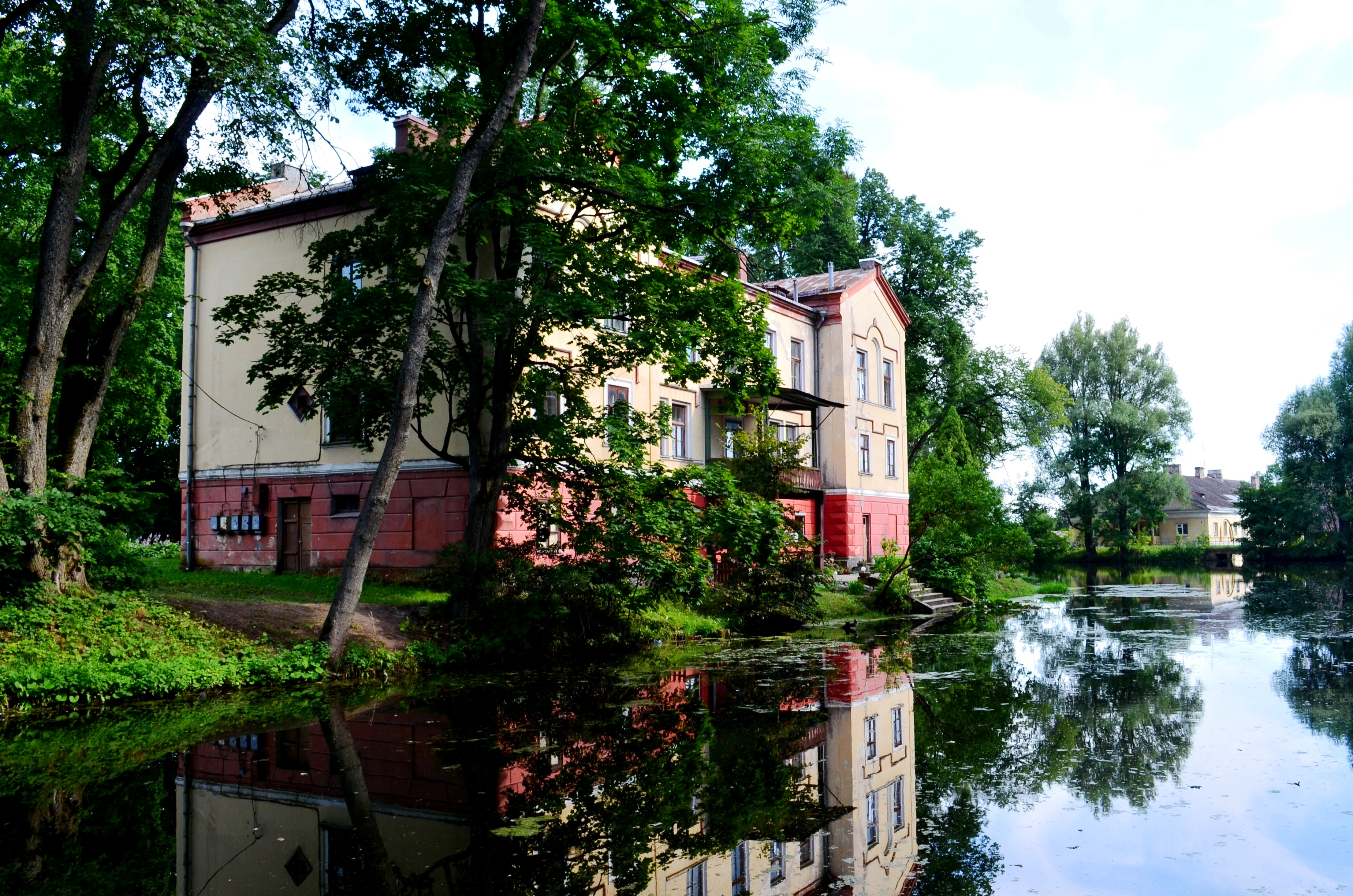 Dotnuvos dvaras, Akademija, Kėdainių raj.